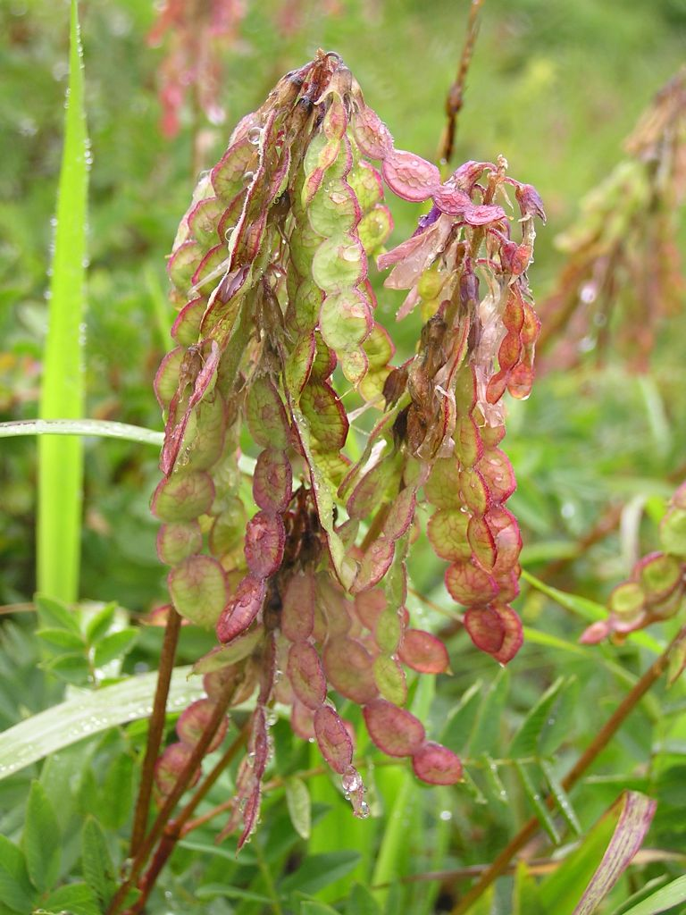 Unreife Gliederhülsen von Hedysarum hedysaroides in der Nähe von Oberlech in Vorarlberg.